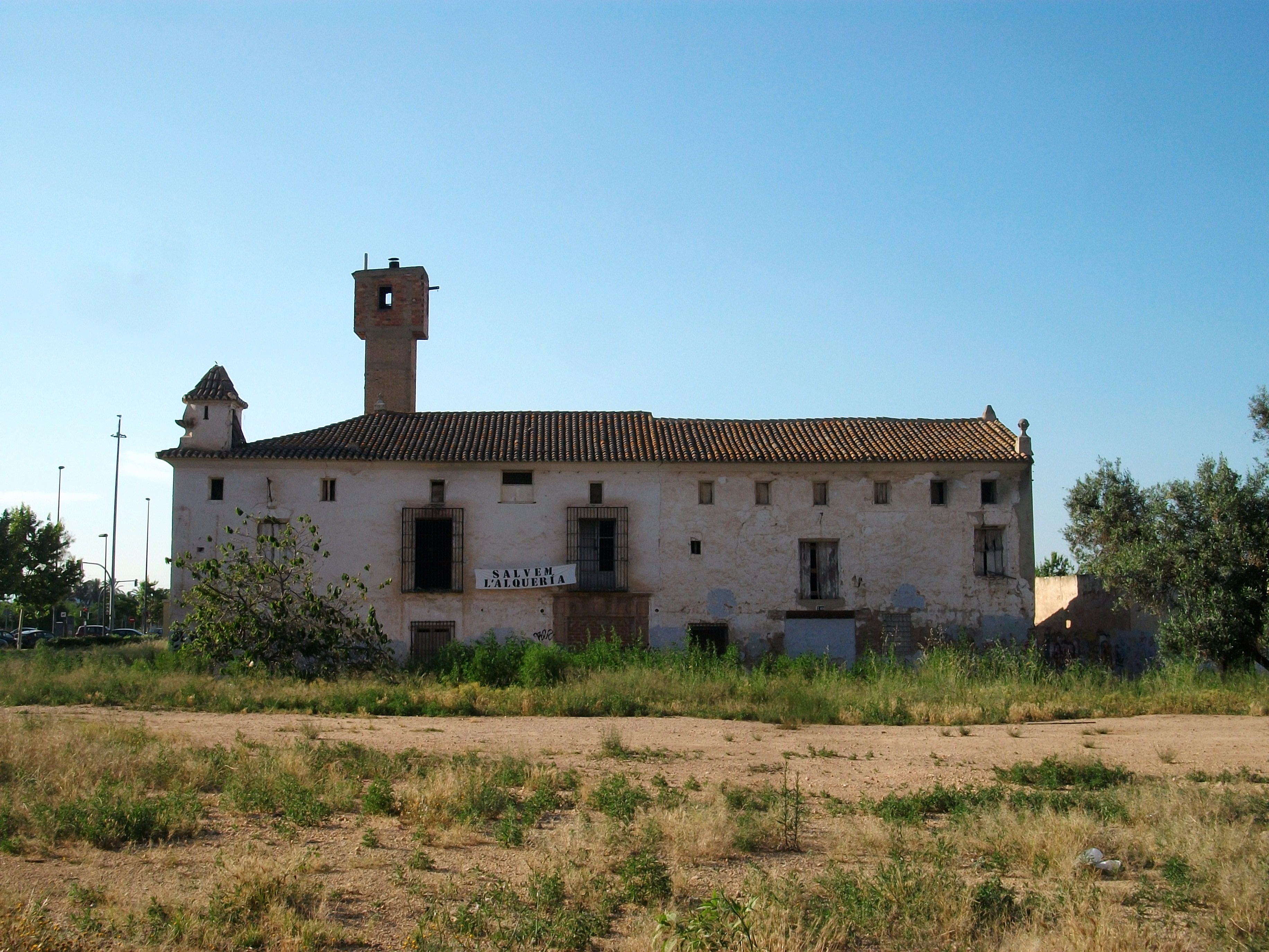 Alqueria de Falcó, Torrefiel, València.